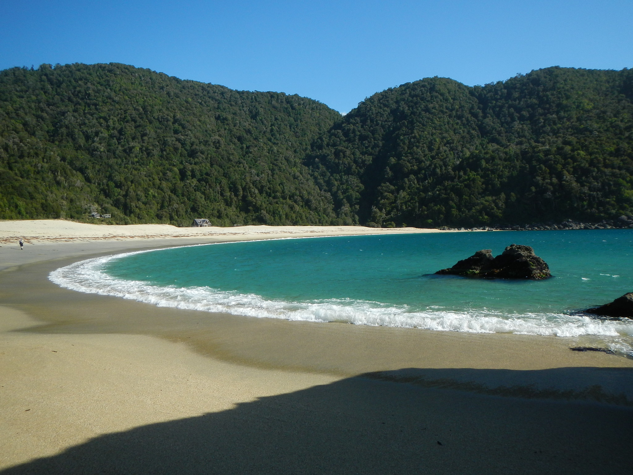 Una de las playas más bellas de Chile.